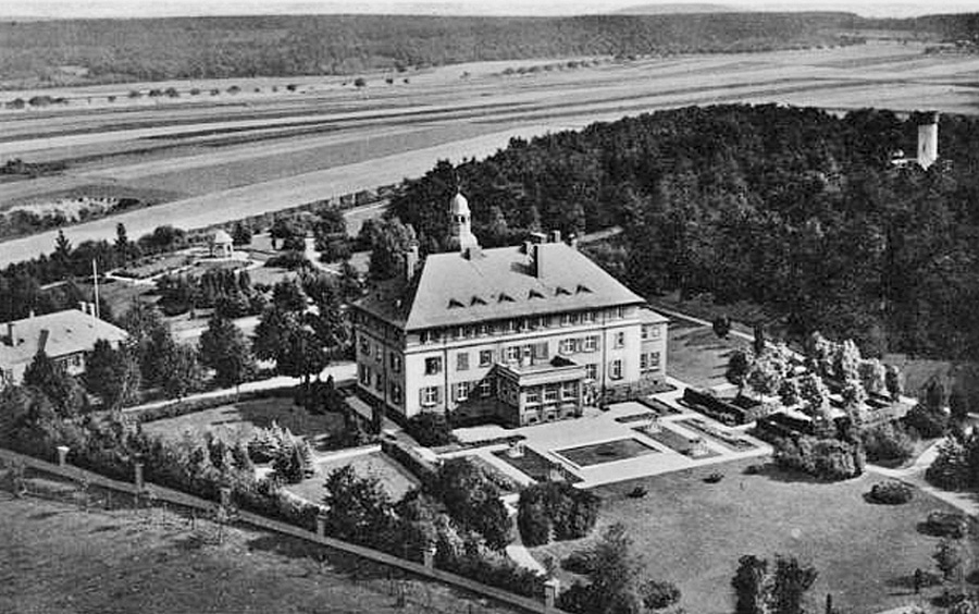 Das von Paul von Bleichert erbaute Landhaus in Klinga bei Leipzig (um 1930)